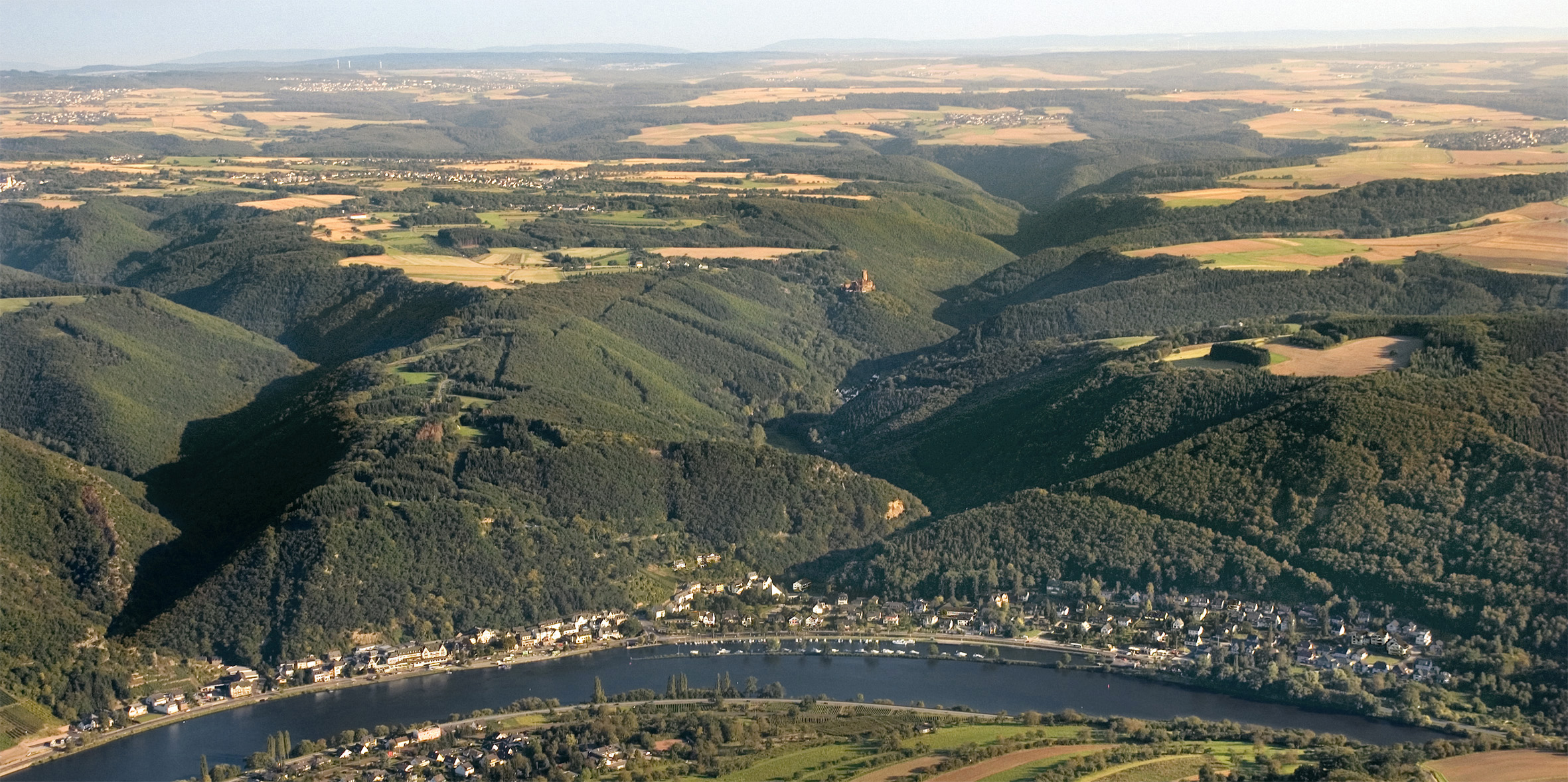 Luftbild von Brodenbach und Umgebung